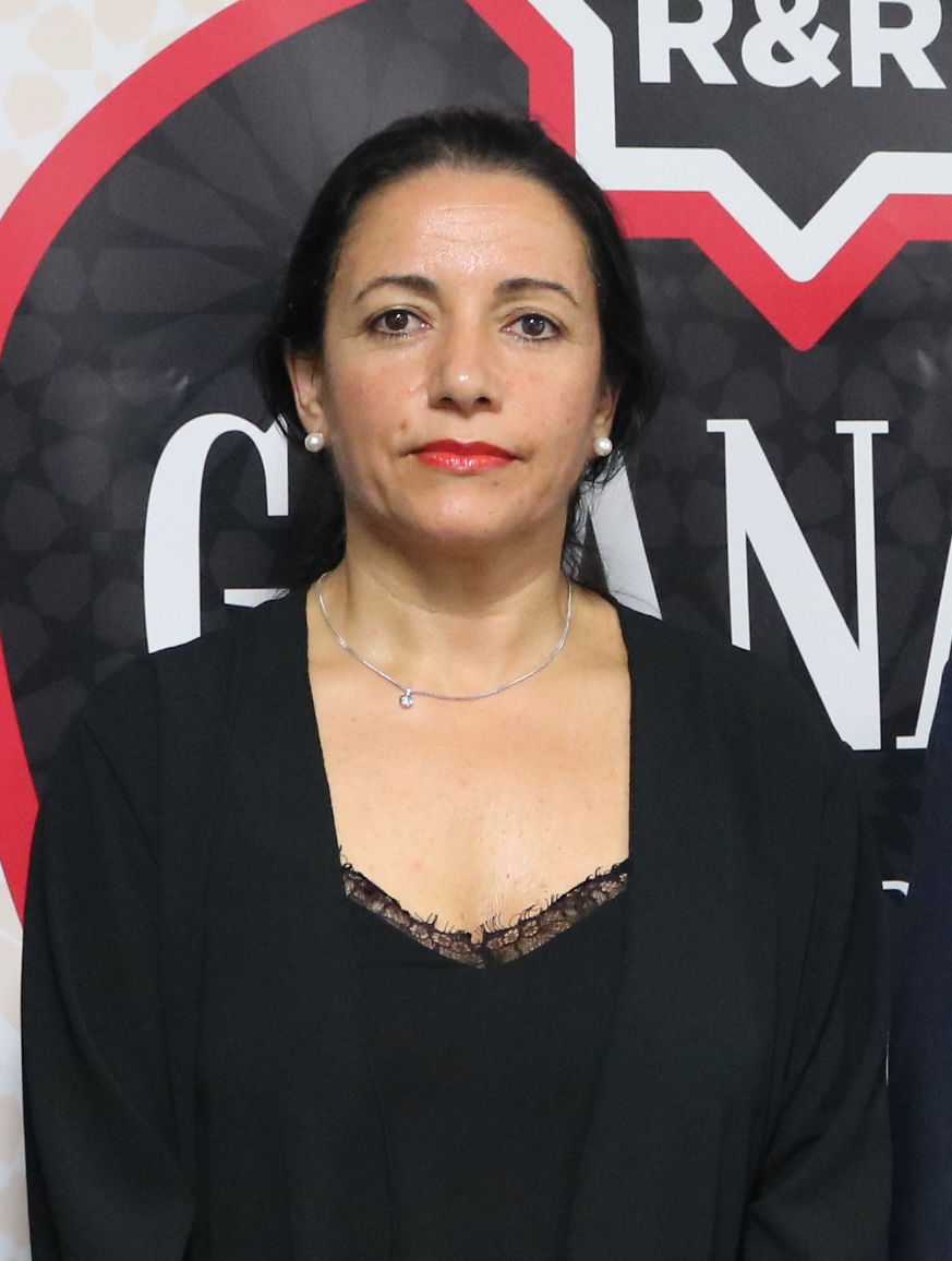 Encuentro con Eva Yerbabuena エバ・ジェルバブエナを迎えて